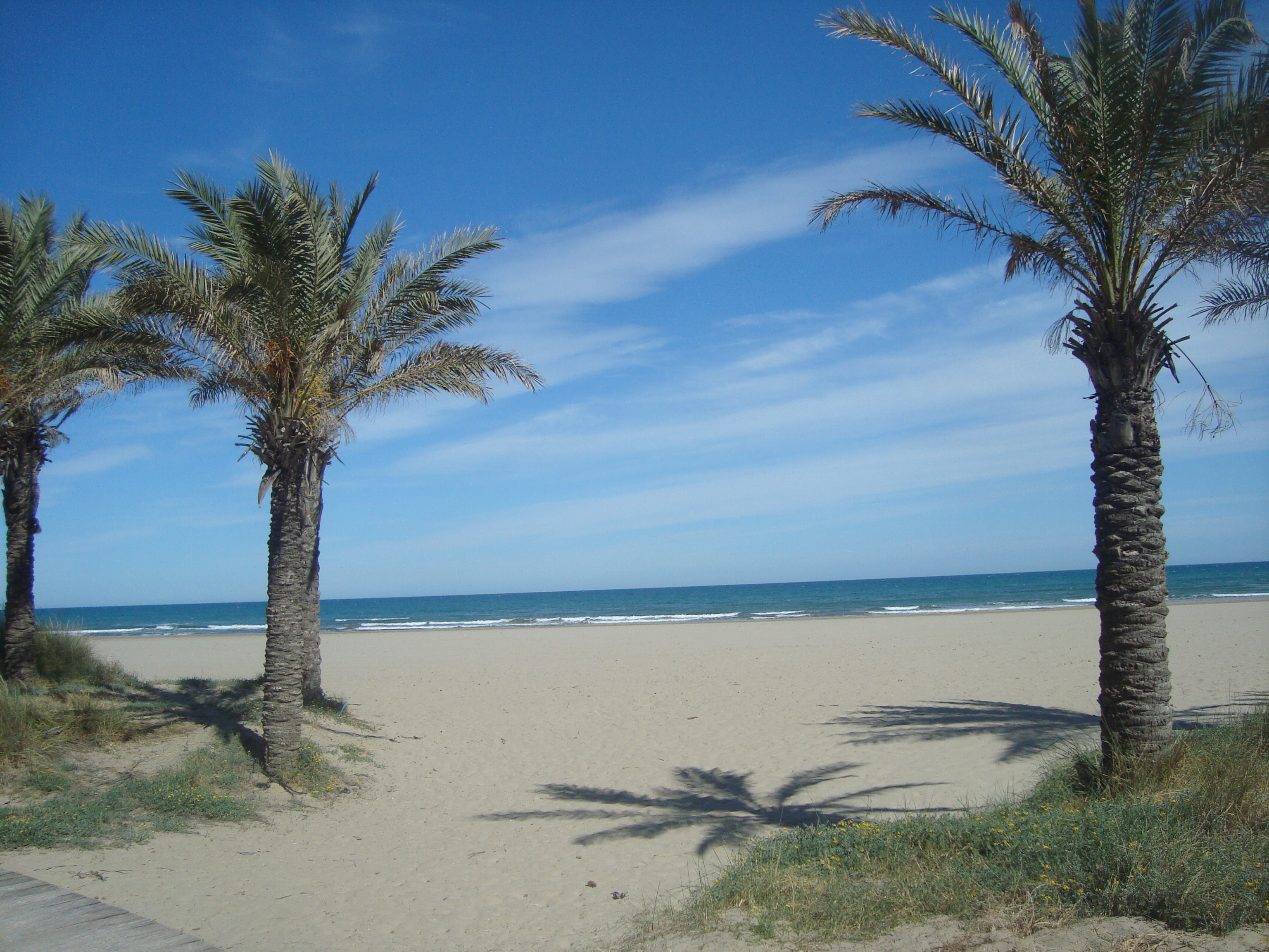 Platja del Pinar (Castelló de la Plana) This is a a photo of a beach in the Land of Valencia, Spain, with id: PL-1434